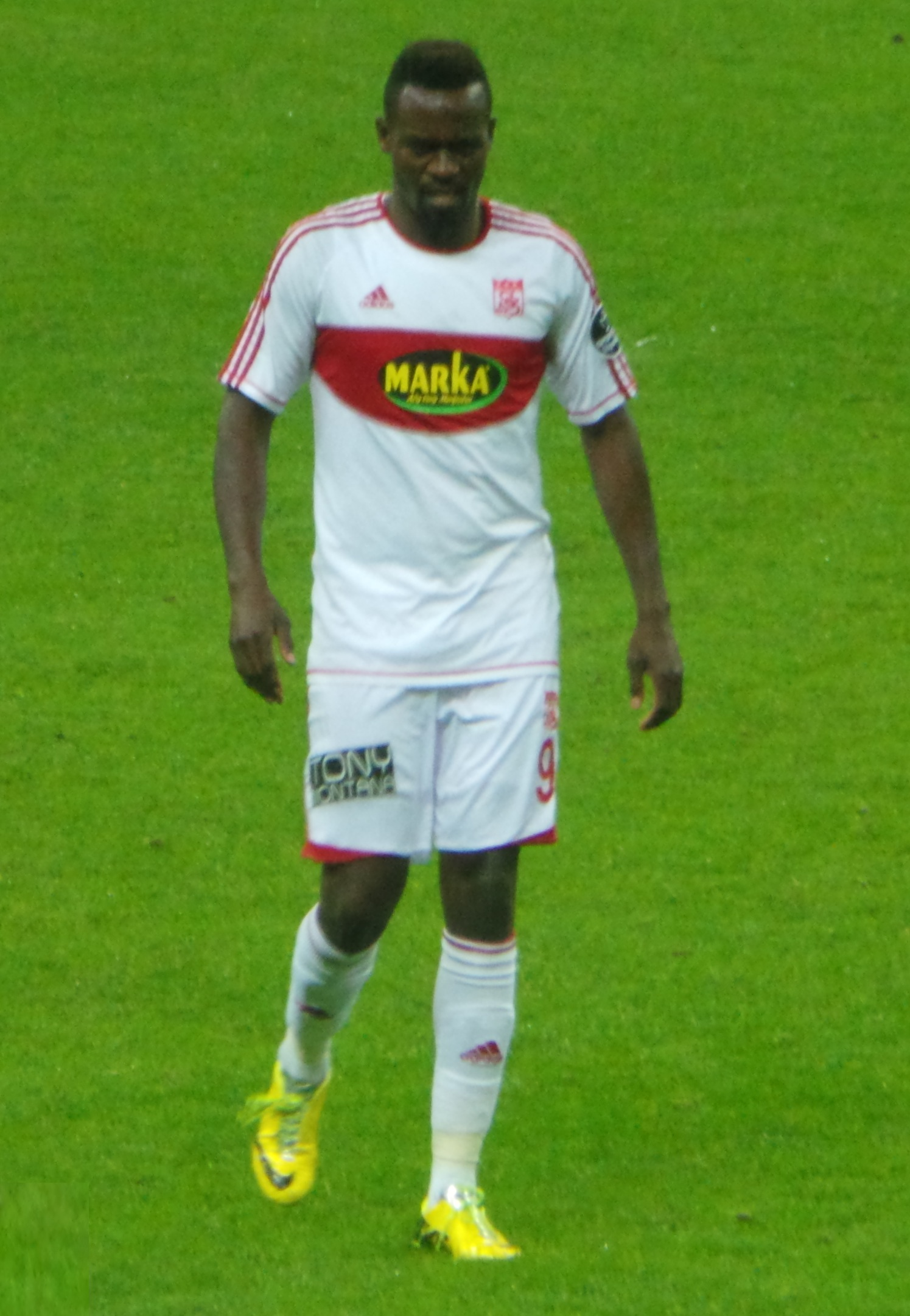 Macauley Chrisantus